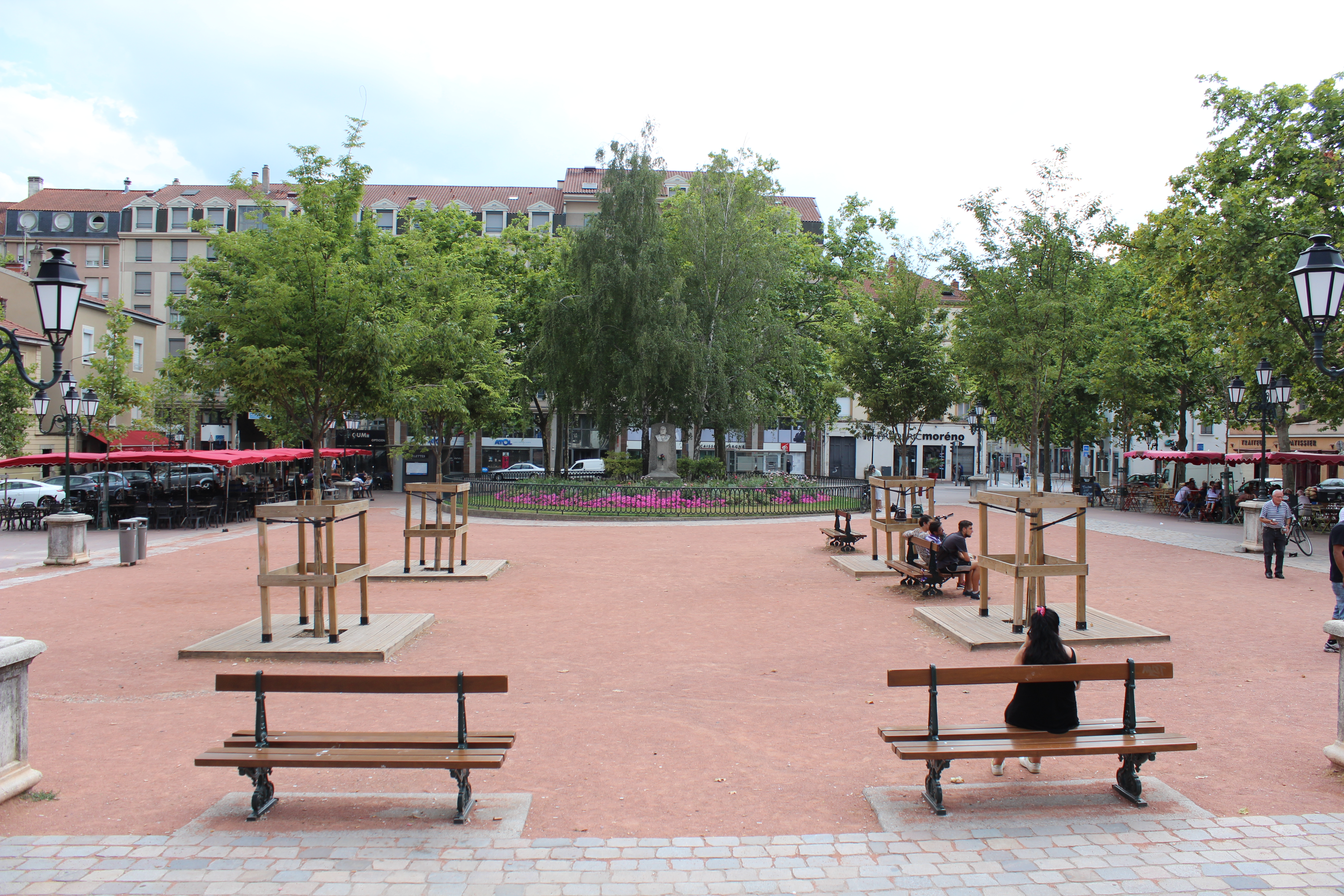 La place Ambroise-Courtois à Lyon.